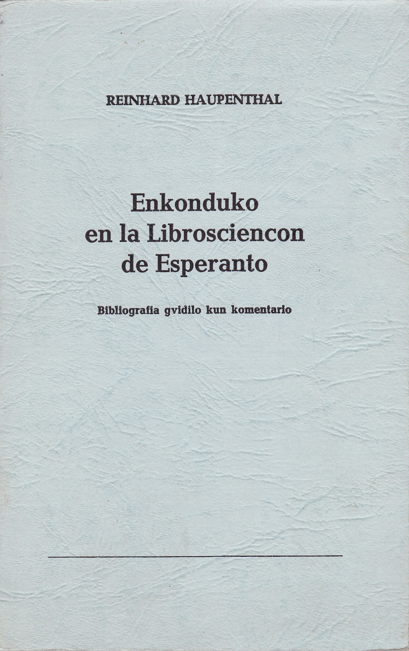 kovrilo de "Enkonduko en la Librosciencon de Esperanto", 1968